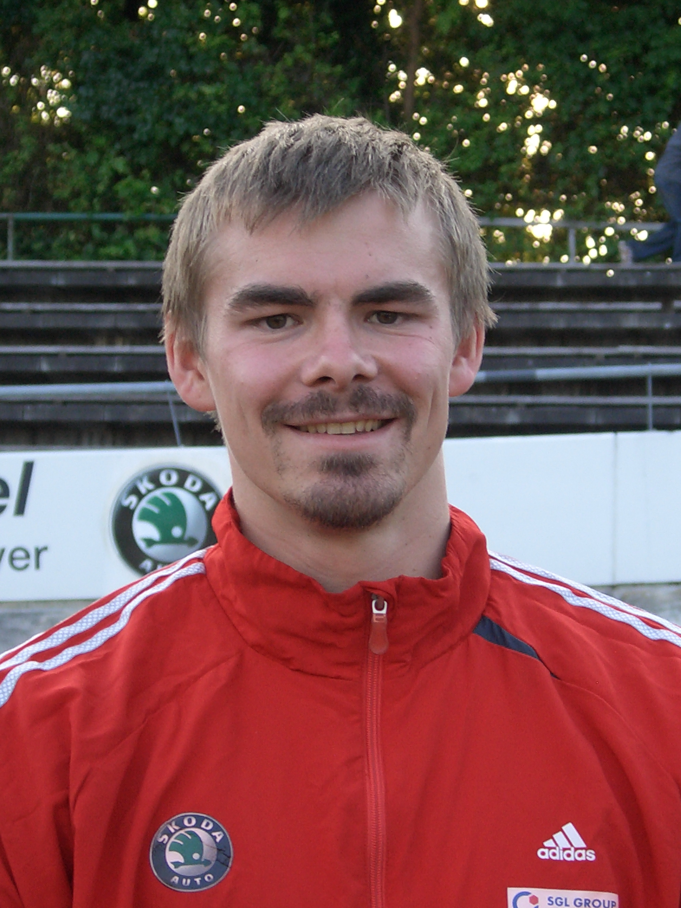 Sebastian Döhrer, deutscher Radsportler